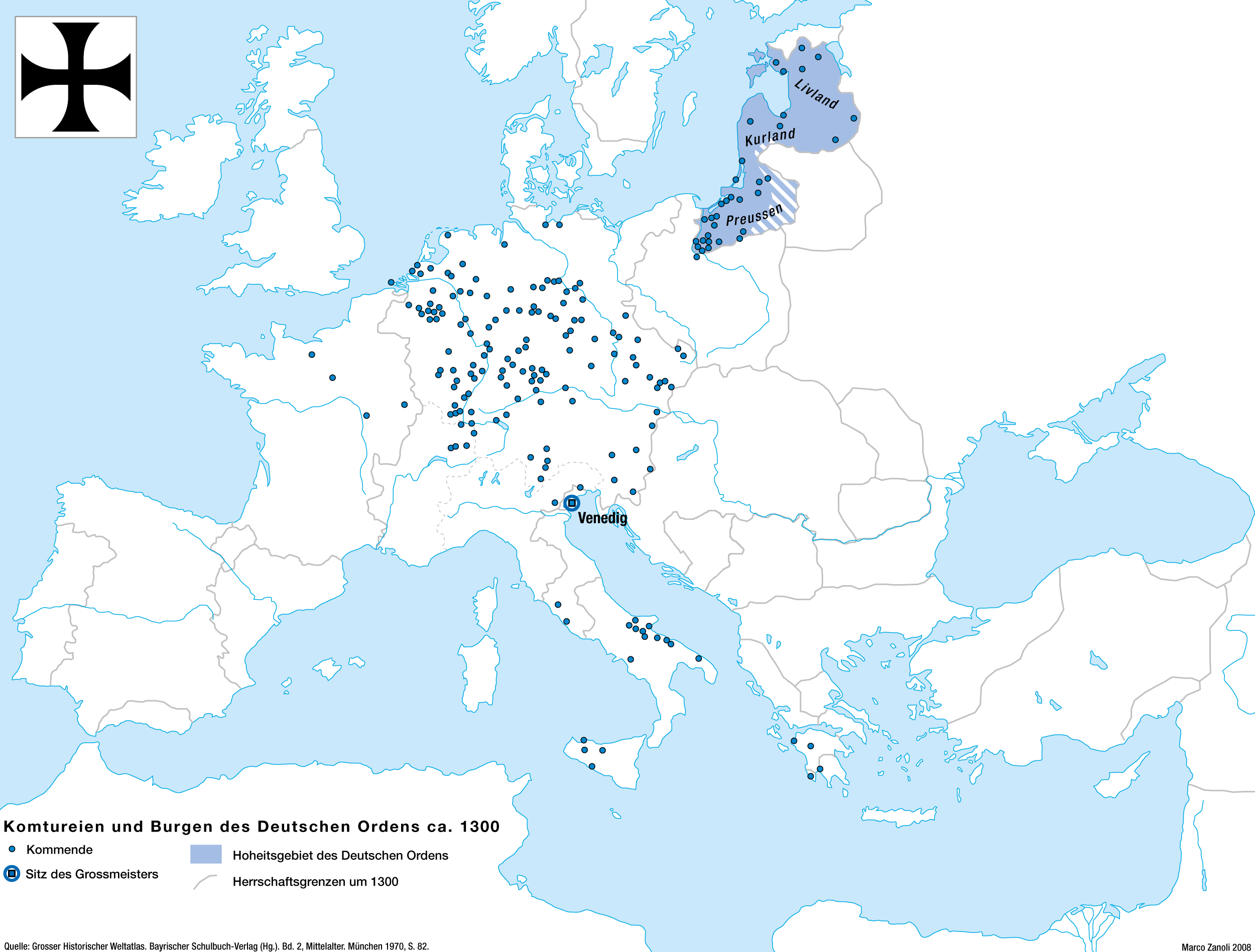 Die Niederlassungen des Deutschen Ordens in Europa um 1300. Karte aus der Saisonausstellung 2008 im Ritterhaus Bubikon, Schweiz („Die Kreuzzüge – eine Spurensuche: Die Ritterorden in der Schweiz”).